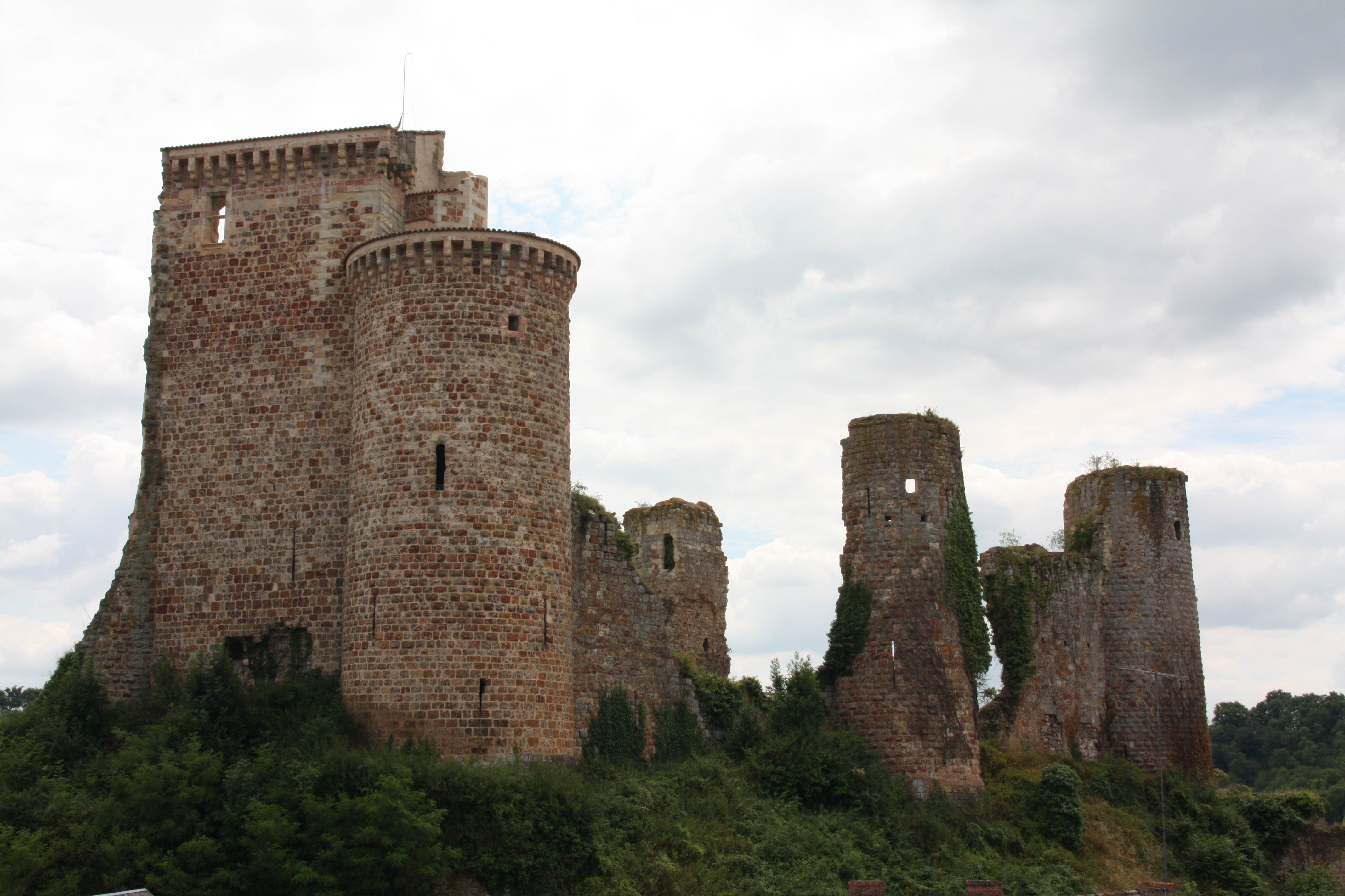 Château d'Hérisson à Hérisson, France